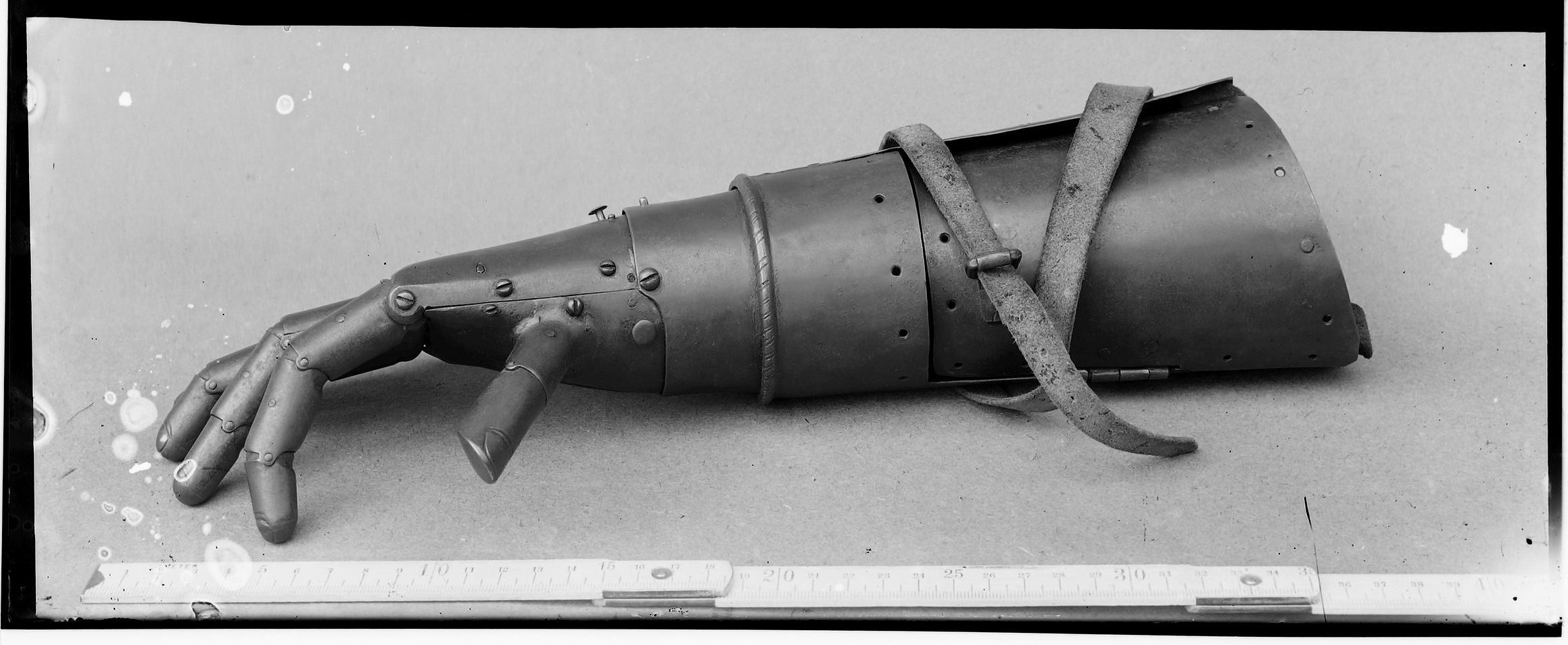 Jüngere Eiserne Hand des Ritters Götz von Berlichingen, um 1530, Museum der Burg Jagsthausen. Glasnegativ von Wilhelm Kratt (1887–1968).